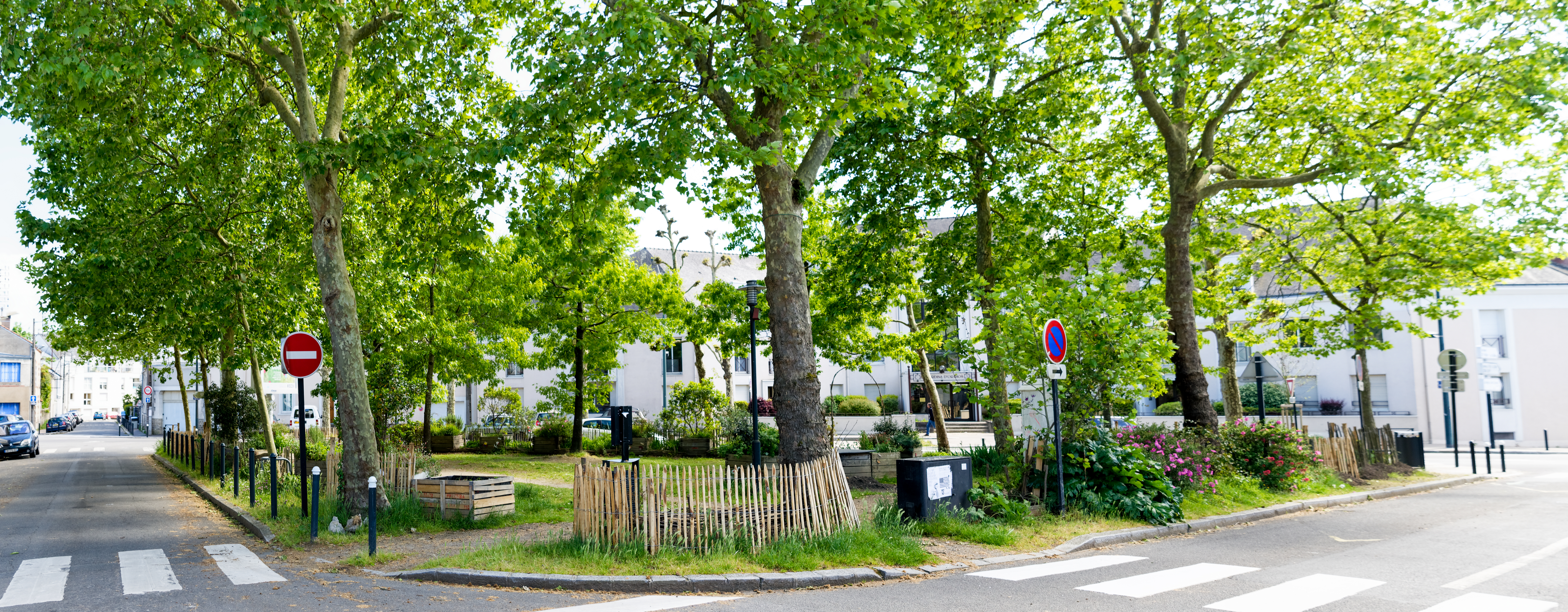 Place du 116ème régiment d'infanterie. (Nantes, Loire-Atlantique, Pays de la Loire, France)